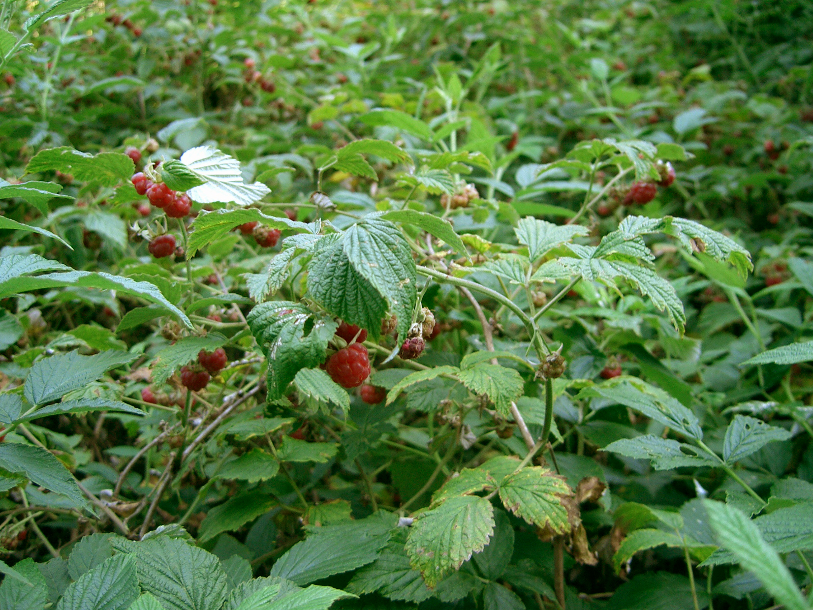 Framboises sauvages en Ardèche - France self made PRA